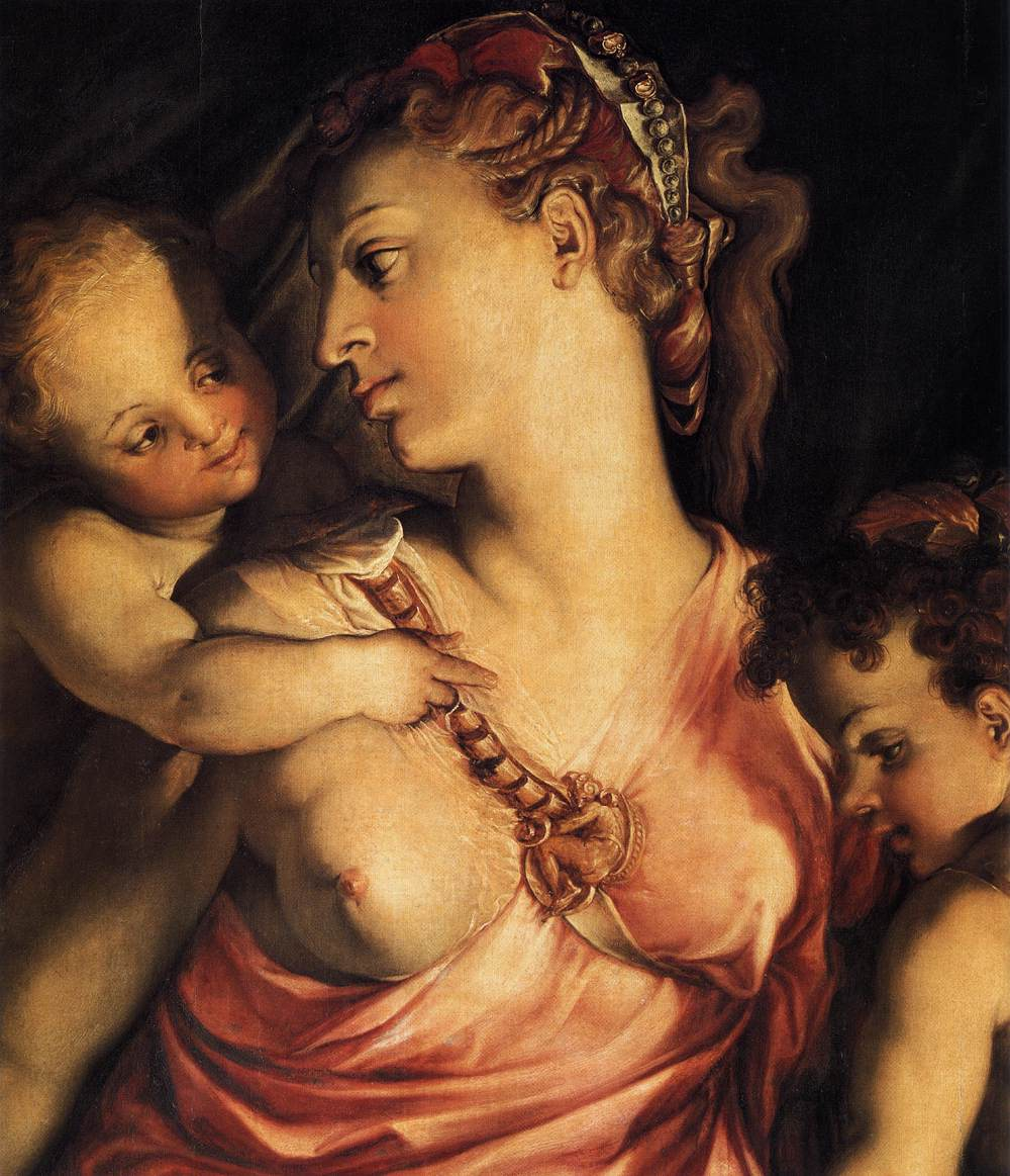 SALVIATI, Cecchino del Charity (detail) Oil on wood Galleria degli Uffizi, Florence